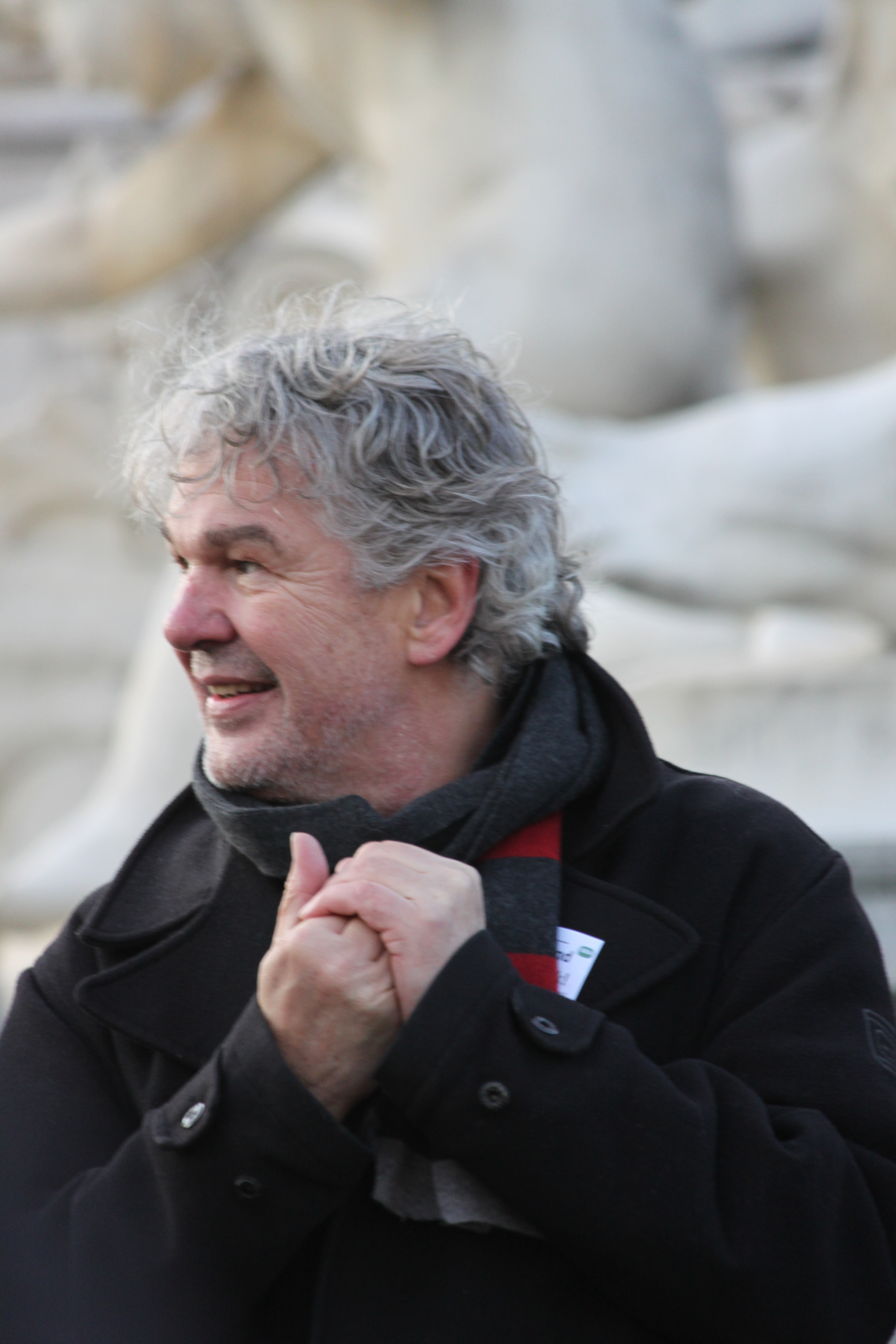 Demonstration, Bürgerrecht statt Bankenrecht, vor dem Parlament in Wien, Heinrich Staudinger